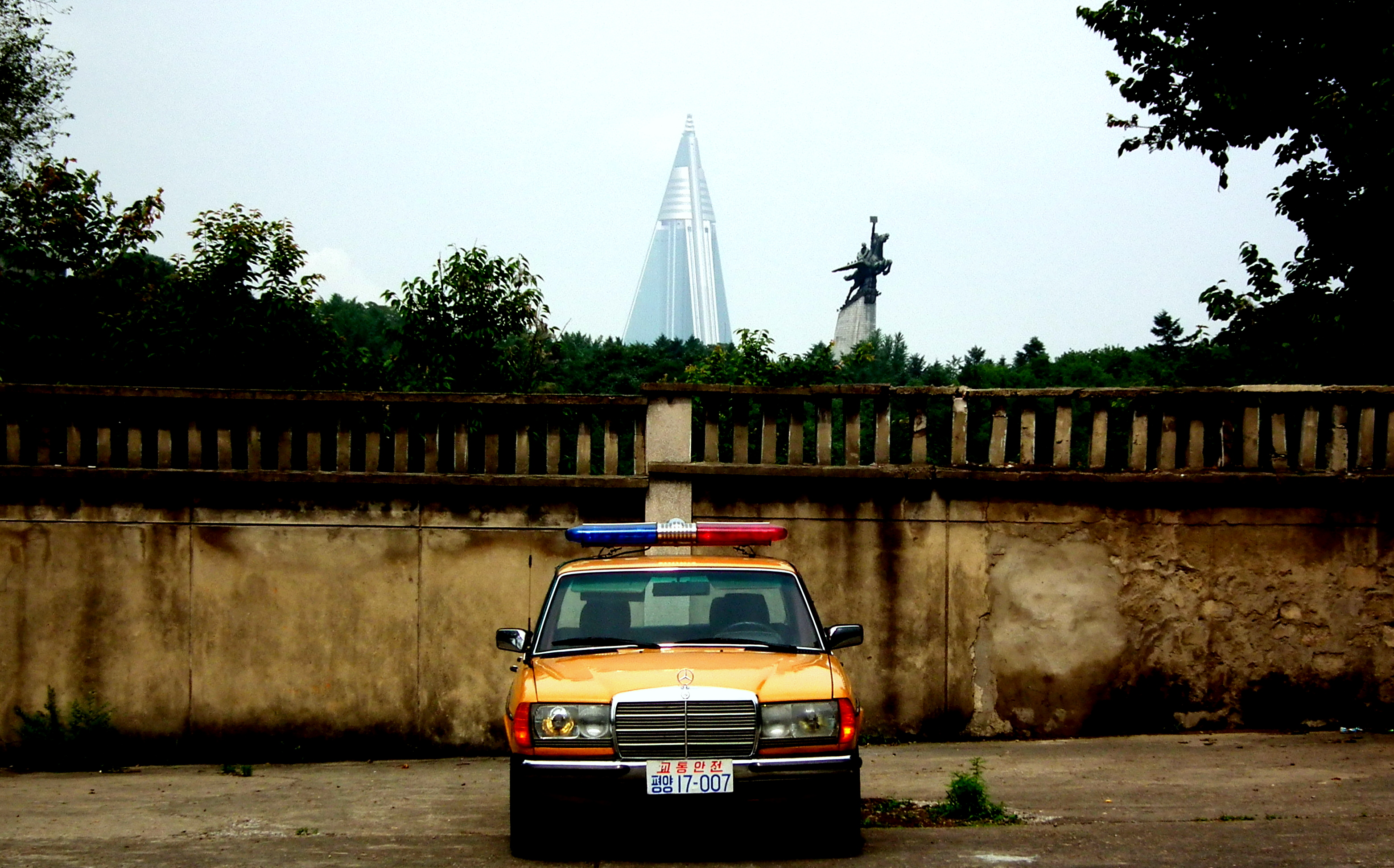 на страже правопорядка